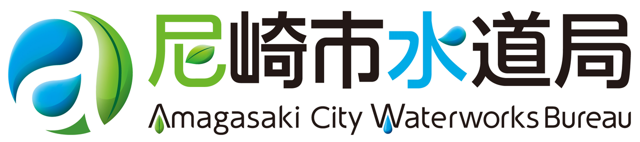 尼崎市水道局ロゴ